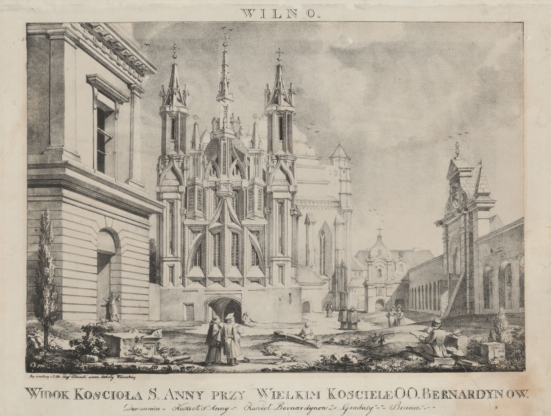 Беларуская (тарашкевіца): Вільня (Vilnia), вуліца Бэрнардынская (vulica Bernardynskaja). Касьцёл Сьвятой Ганны